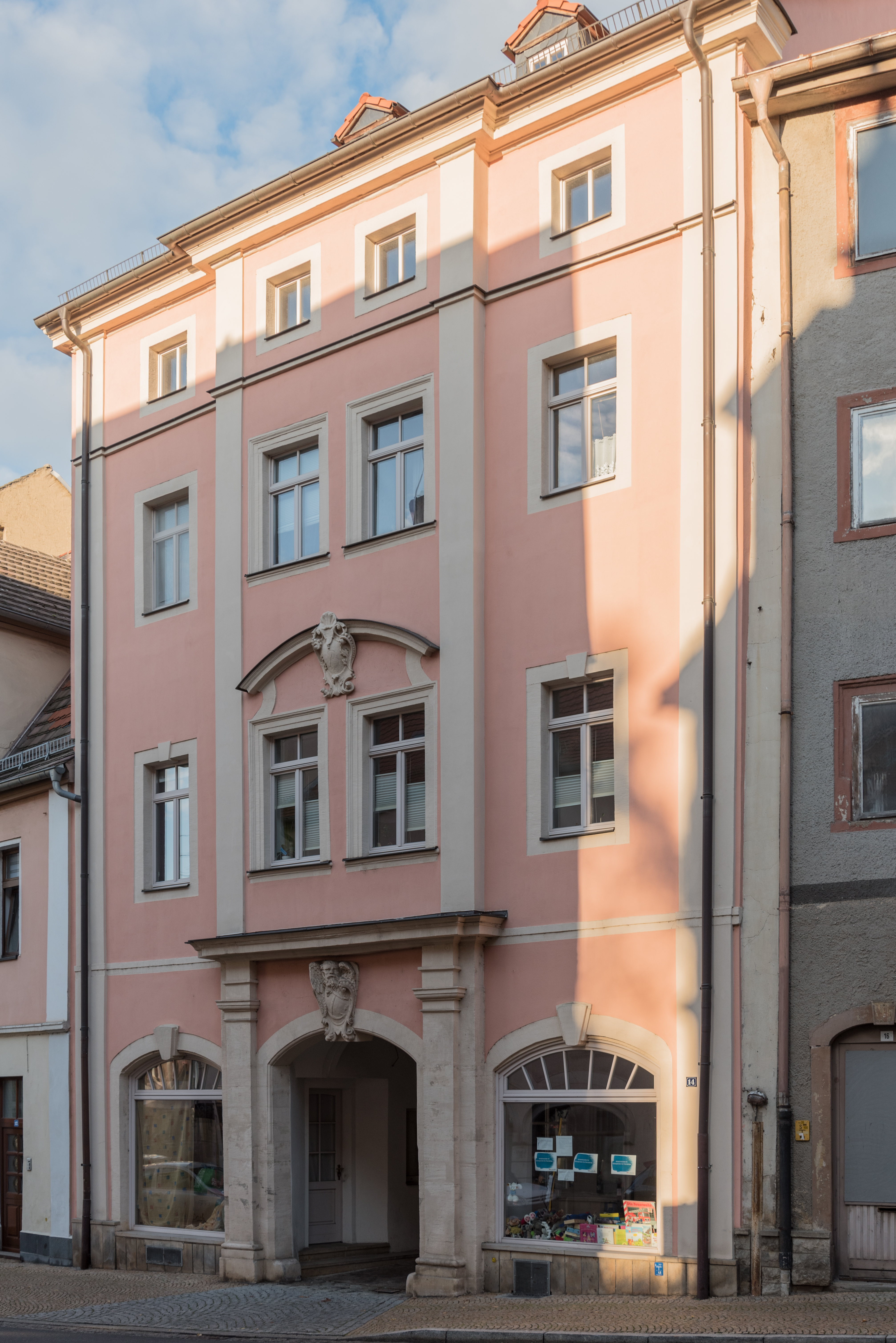 Weißenfels, Große Burggasse 14